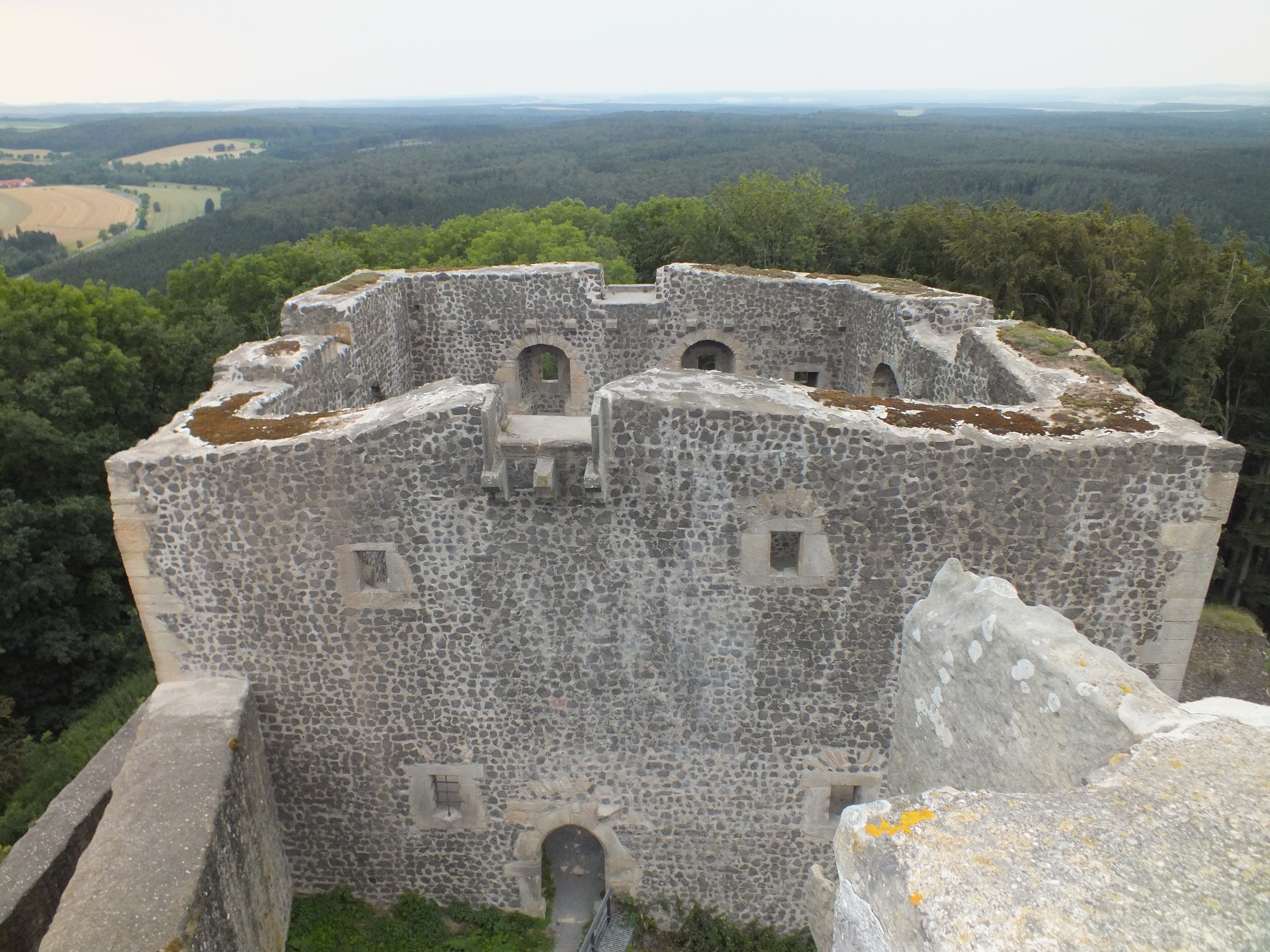 Der Nord-West-Turm der Weidelsburg